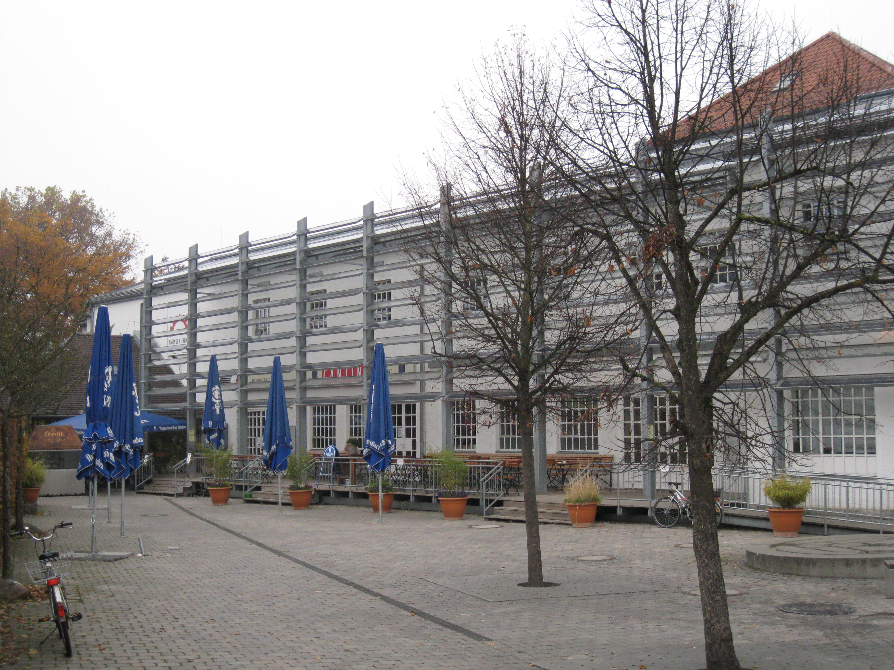 Pasinger Fabrik - Kulturzentrum in München-Pasing